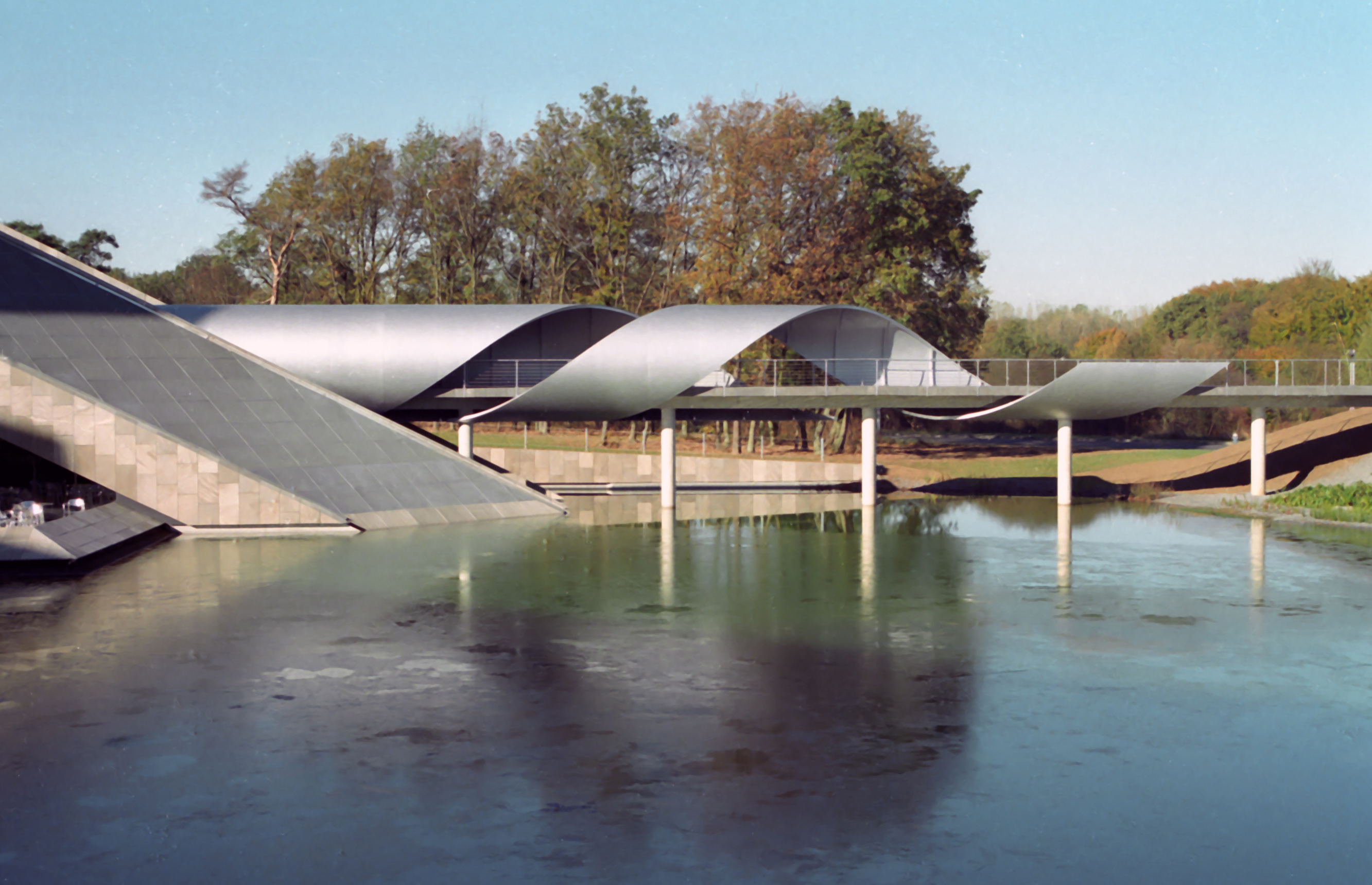 N. Müller-Everling, Spiralskulptur um den Steg durch das Kasino, Verteidigungsministerium, Bonn